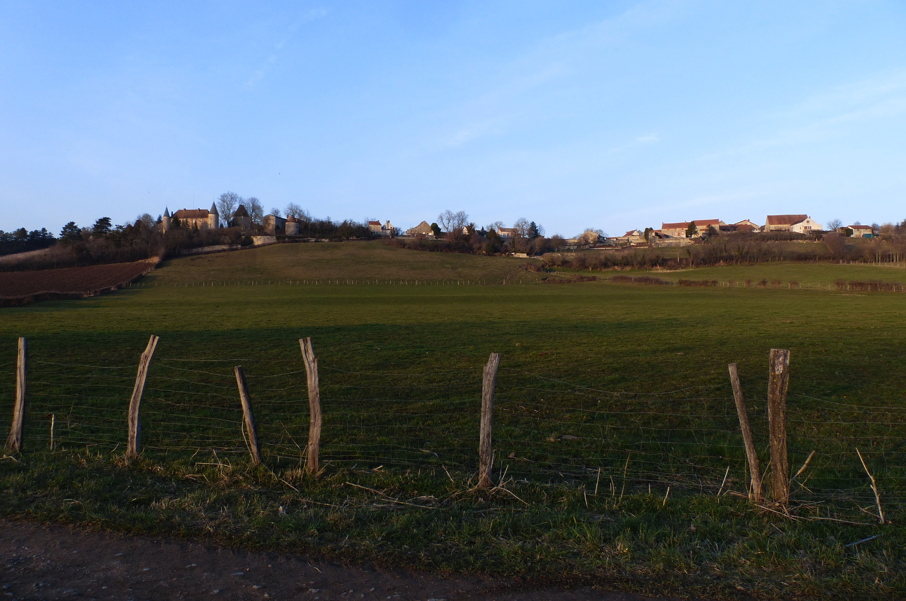 Vicq (Allier, France). Le village d'Arçon dominant la cuvette d'Ébreuil, vu du sud. À gauche, le château d'Arçon.